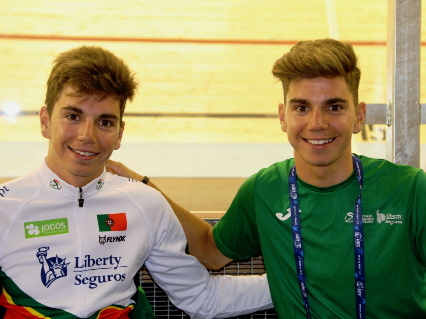 Ivo (l.) und Rui Oliveira, portugiesische Radsportler